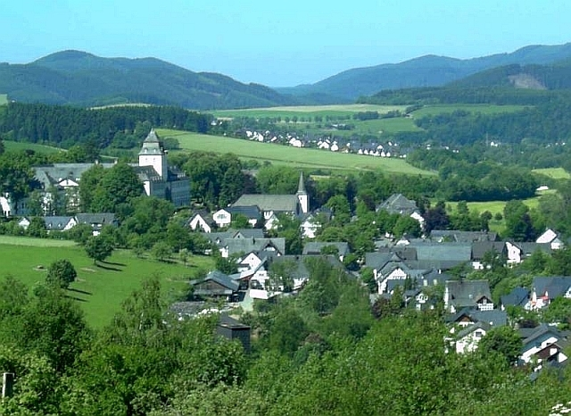 Ort Grafschaft in der Stadt Schmallenberg , Germany.